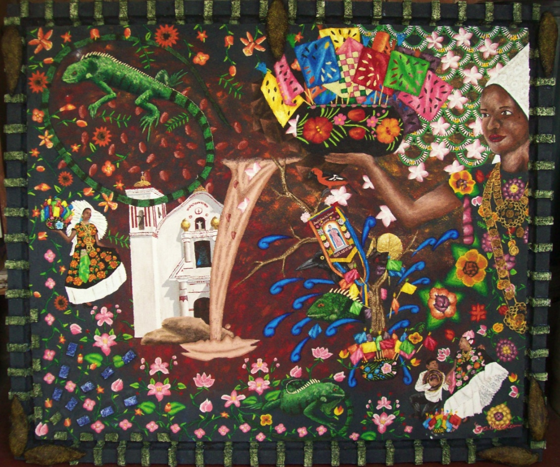 Oleo que muestra parte de la escénica de Juchitan